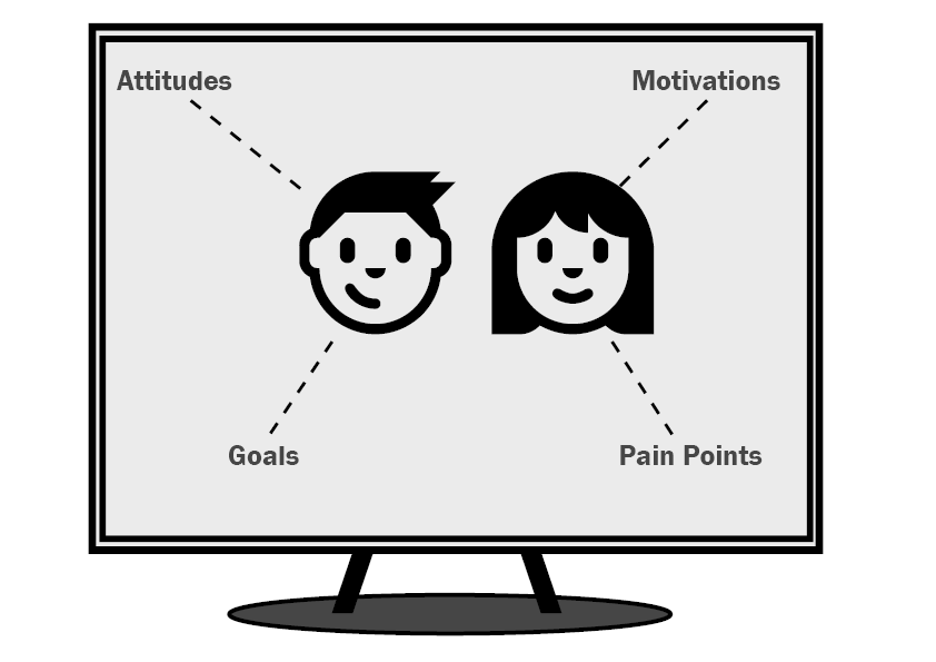 Das Persona Based Design dreht nicht um die User und ihre Wünsche. Die Grafik verbildlicht das.